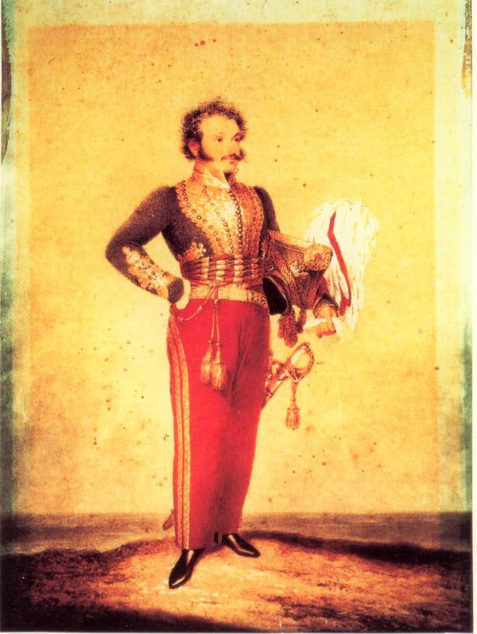 José Antonio Páez dressed like Hussar, in 1828.